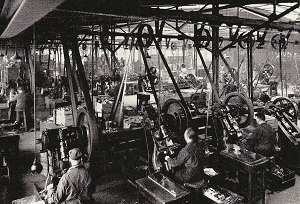 Fra blikkemballasjeavdelingen ved NOBØ i Trondheim i mellomkrigstiden.